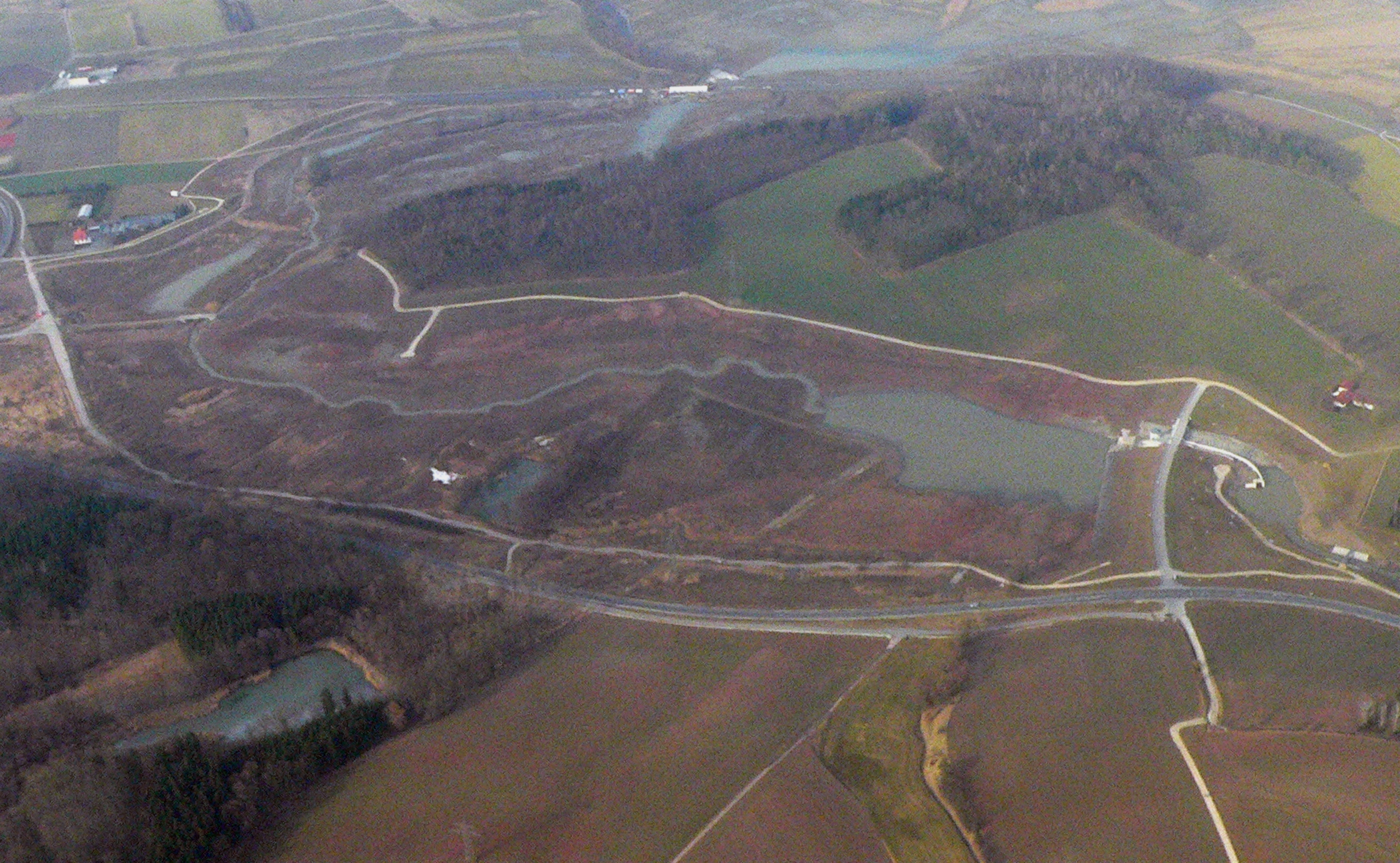 Hochwasserrückhaltebecken Goldbergsee in Coburg, Bayern - Beginn der Füllung März 2009